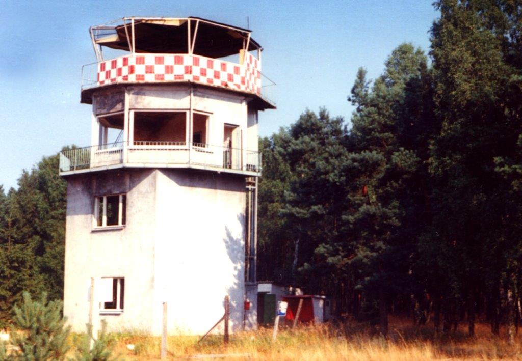 Control-Tower am russischen Feldflug- und Bombenabwurfplatz in der Retzower Heide